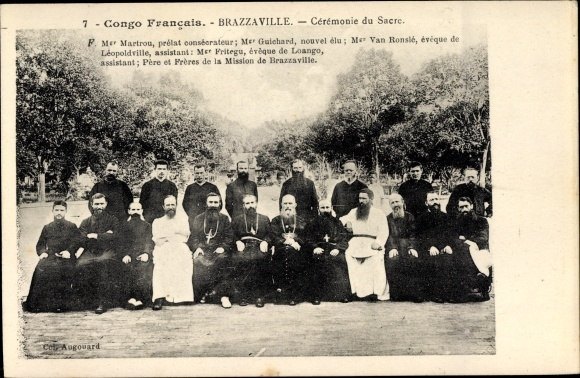 Congo Français - Brazzaville Cérémonie Sacre de Mgr Guichard par Mgr Martrou (prélat consécrateur); Mgr Guichard (nouvel élu); Mgr Van Ronslé, évèque de Léopoldville, assistant; Mgr Friteau, évèque de Loango, assistant; Père et frères de la mission de Brazzaville